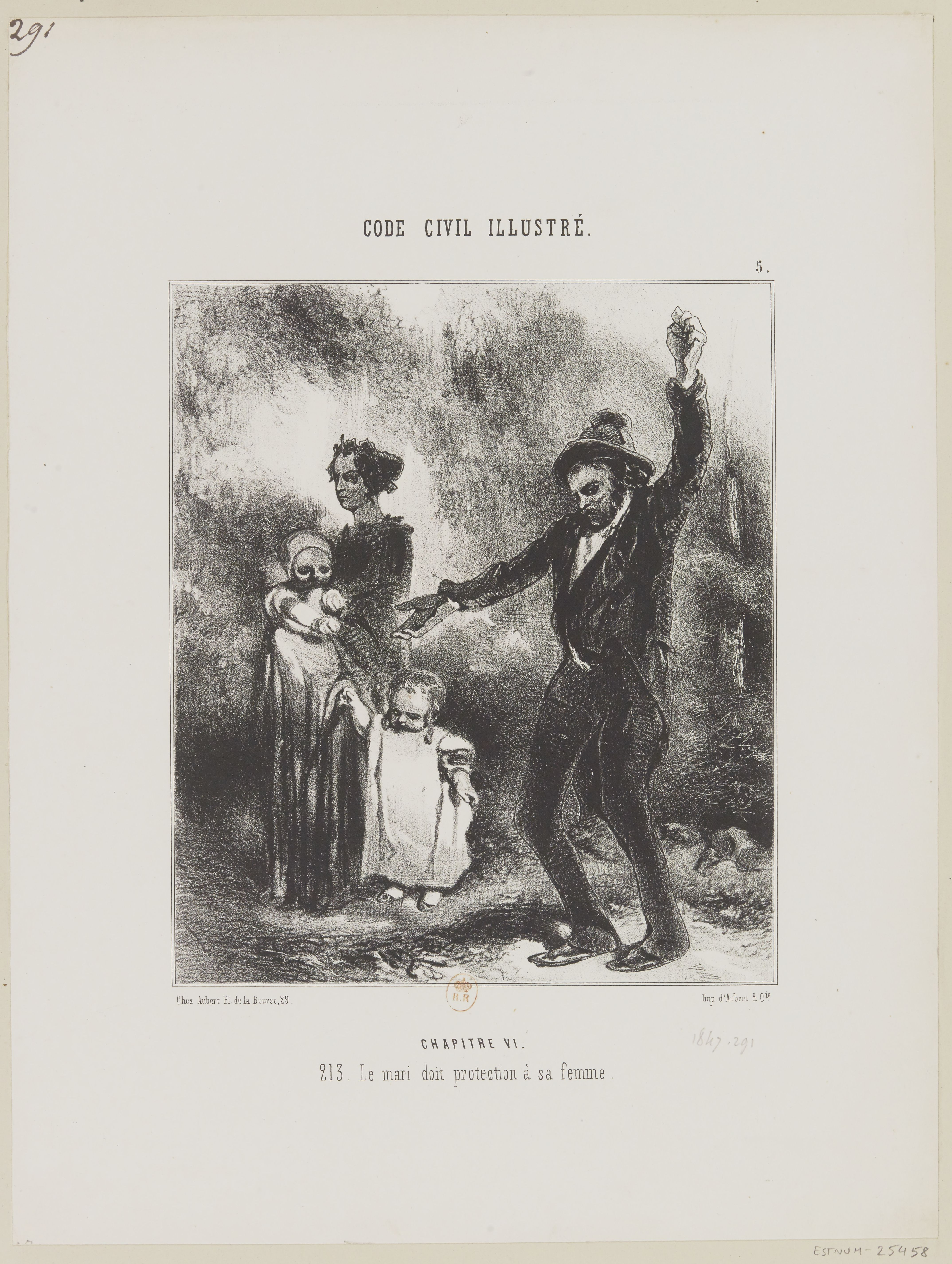 Code civil illustré / article 213 / le mari doit protection à sa femme : [estampe]